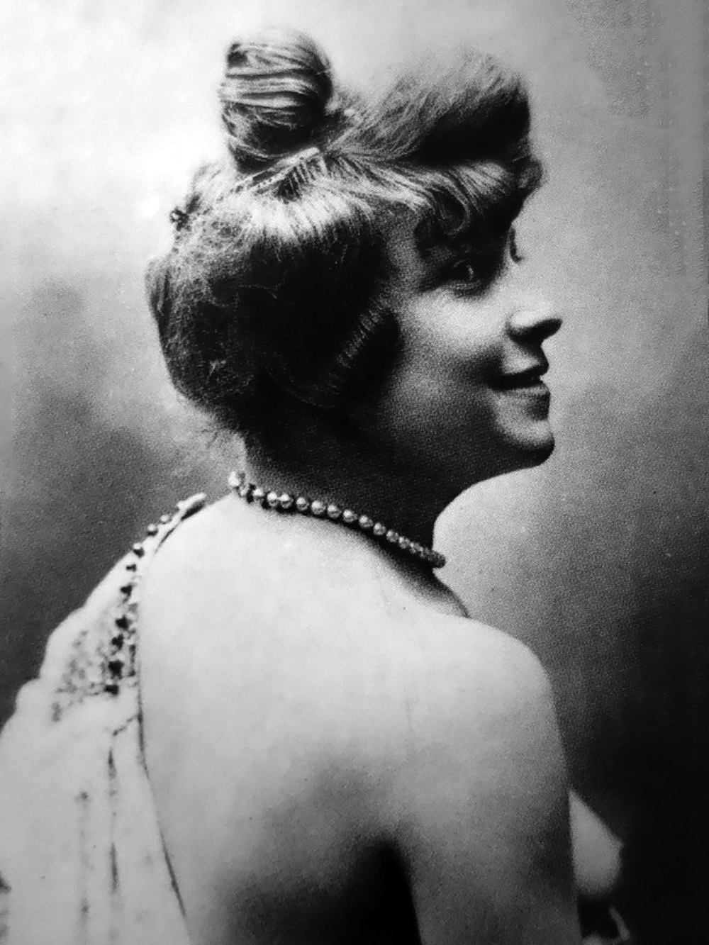 Amélie Élie, dite Casque d'or.